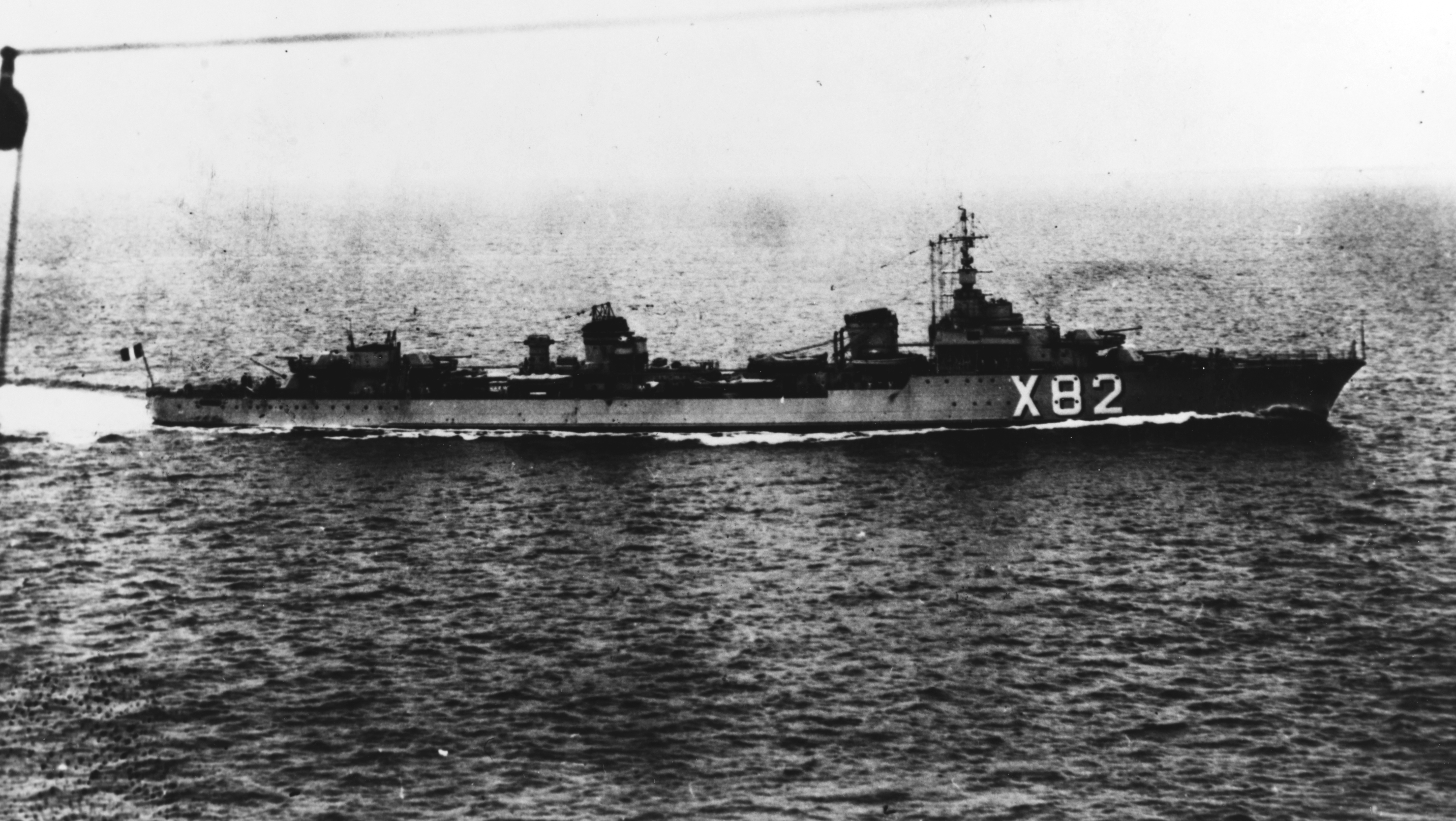 The French destroyer Le Malin underway, after 1 April 1939.